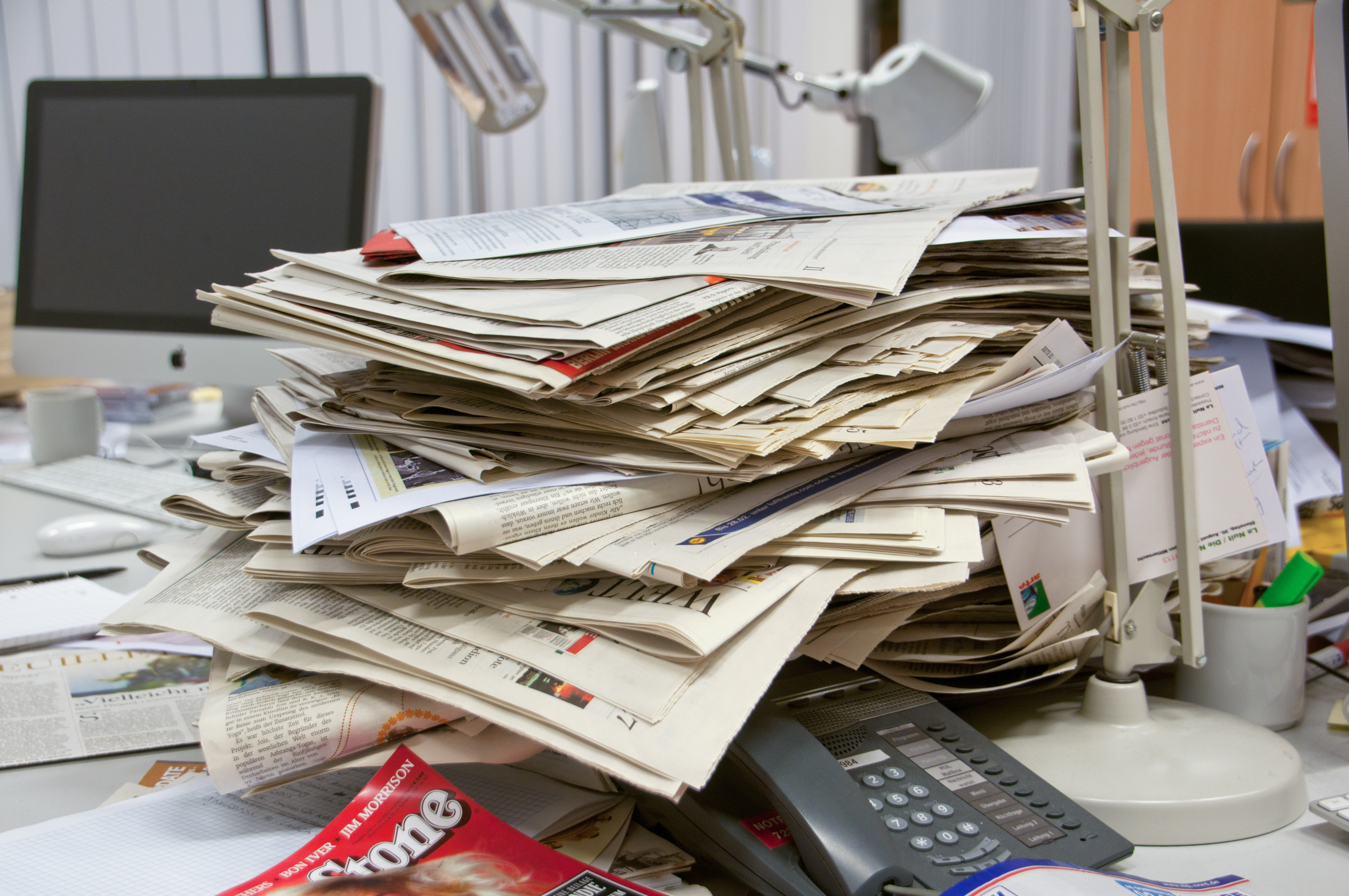 Wikipedia Stammtisch Berlin zu Besuch im Springer- Hochhaus